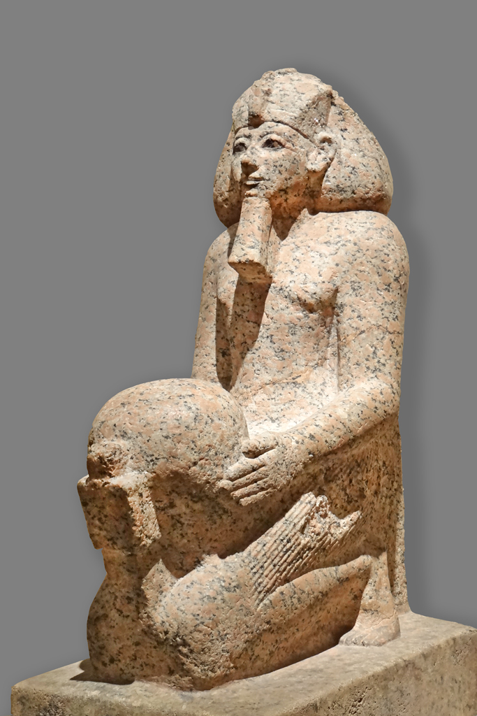 Statue de la Reine Atshepsout agenouillée tenant un vase rituel Nouvel Empire 18ème dynastie, 1475 avant J.-C. Granit rouge 87 cm Thèbes ouest / Deir-el-Bahari Œuvre présentée au Neues Museum à Berlin La statue conservée au musée de Berlin montre qu'Atshepsout porte, comme un roi, la coiffure appelée "Khat" avec l'uraeus sur le front et la barbe de cérémonie attachée au menton. Le vase rituel placé sur ses genoux est décoré d'un pilier appelé "djed" (le pilier djed est le symbole-clé du rétablissement de l'ordre universel). On peut néanmoins observer que son visage a des traits féminins et que ses yeux sont entourés de kohol.